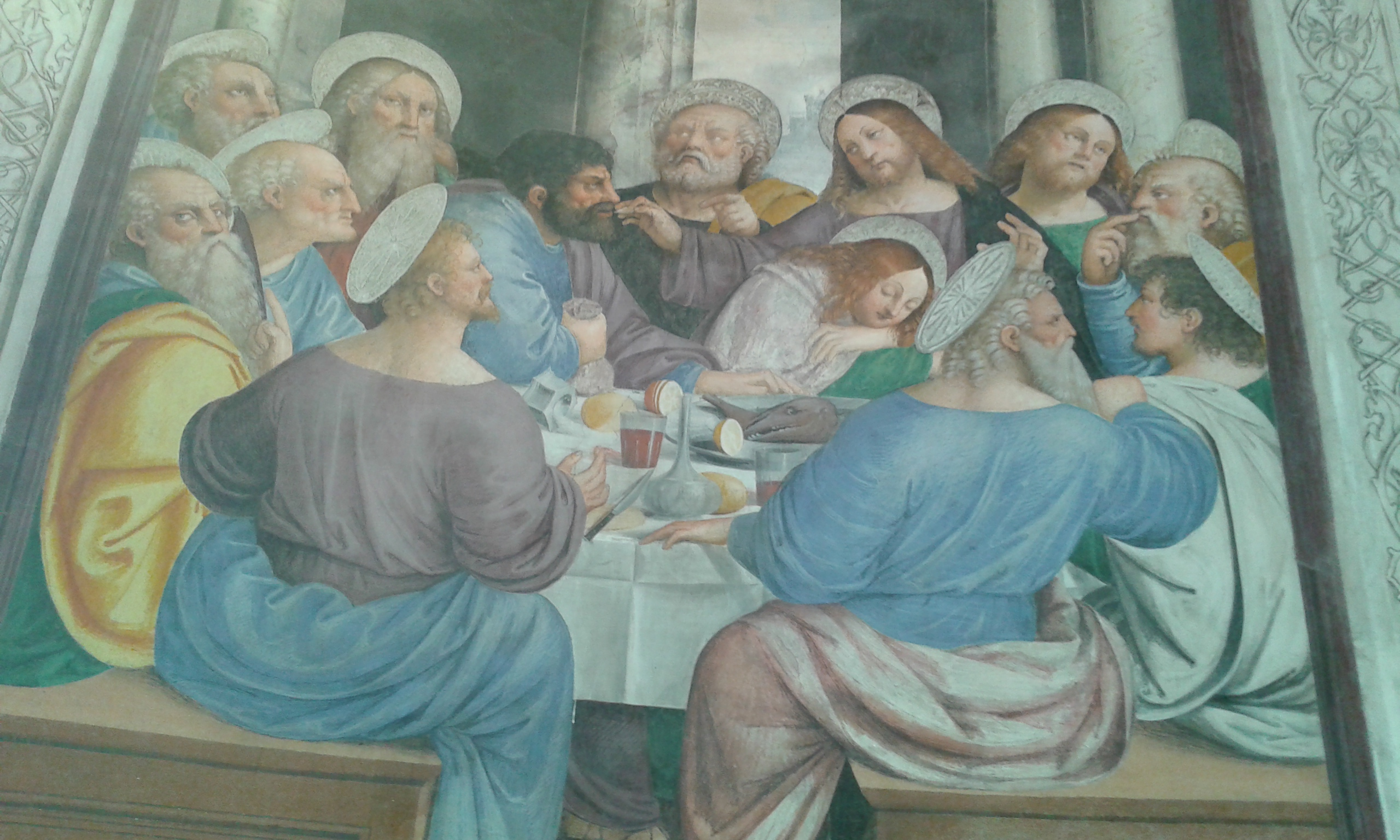 Foto di affresco all'interno della chiesa dei santi Pietro e Paolo a Crevola.